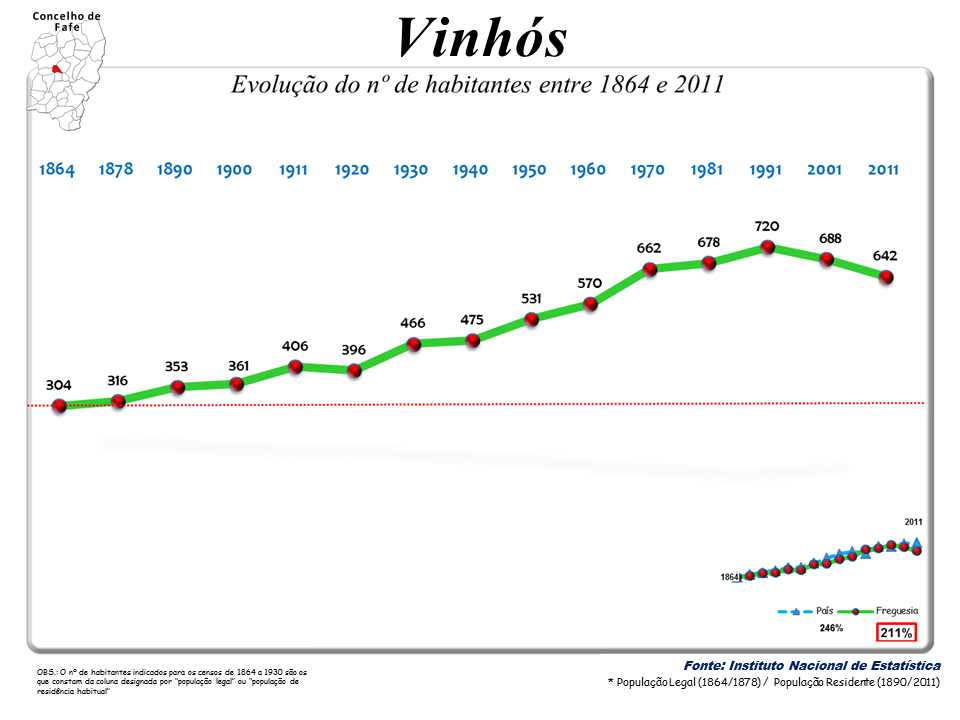 Censos 1864/2011